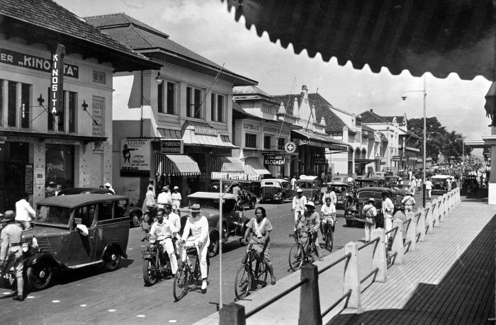 Repronegatief. Een van de activiteiten van Gouverneur-Generaal Daendels, waardoor hij zowel beroemd als berucht is geworden, was de aanleg van de zogeheten grote postweg. Die zou uiteindelijk van het uiterste Westen naar het verre Oosten van Java zou lopen. Hierdoor werden de verbindingen over land meteen stukken beter, maar de aanleg van de weg schijnt veel mensenlevens gekost te hebben. Hier zien we een stukje postweg met, naast auto's en motoren, dat andere, toen vrij nieuwe middel van vervoer, de fiets. Dit werd na de onafhankelijkheid zeer populair, maar ook daar heeft motorisering nu toegeslagen. (P. Boomgaard, 2001). Verkeersdrukte op De Groote Postweg Oost in de binnenstad van Bandoeng